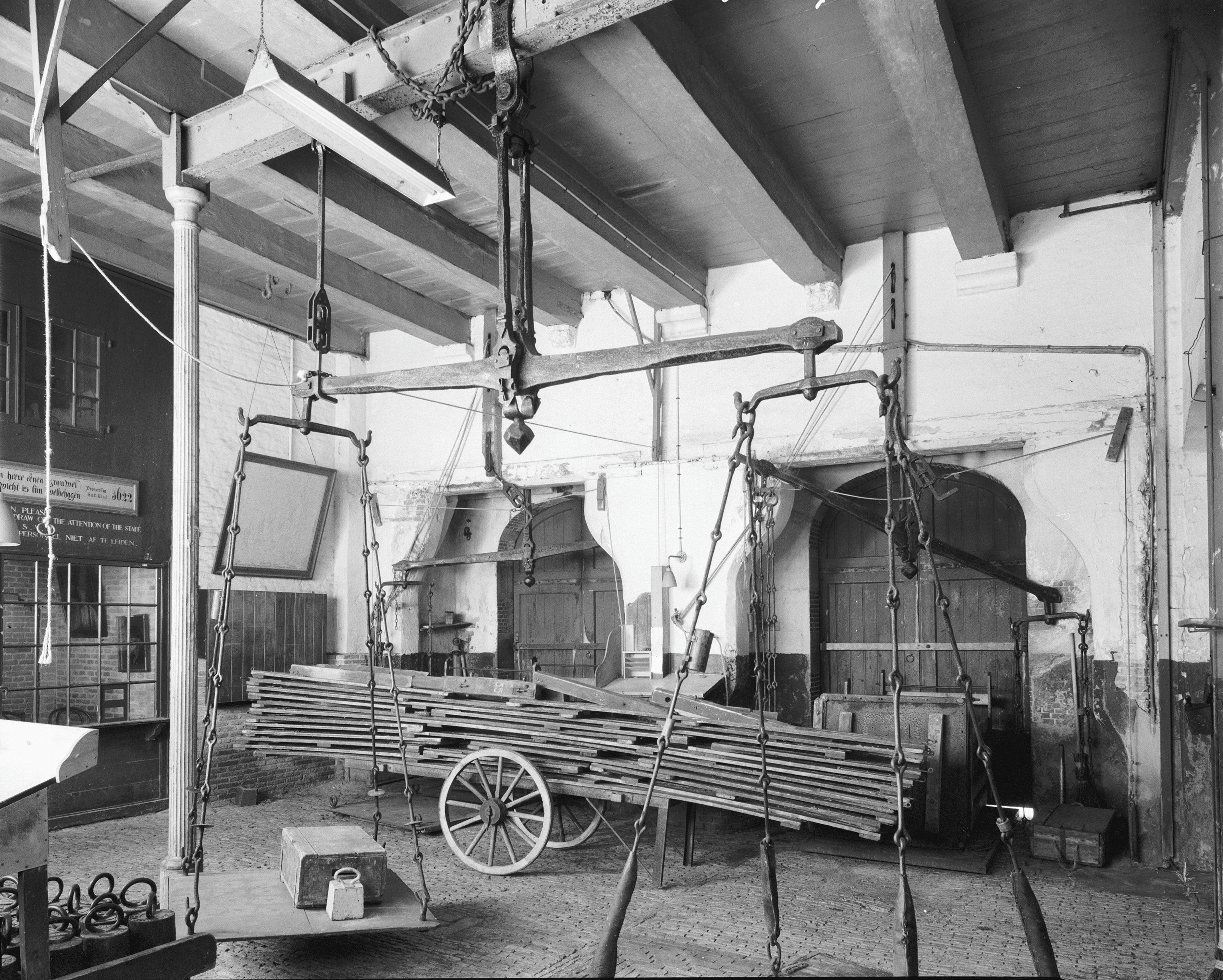 Waag: interieur weeghal